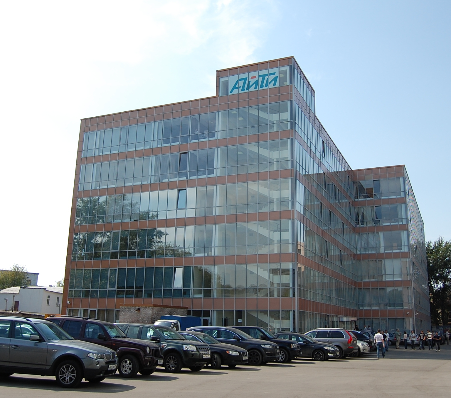 Офис АйТи (Москва, улица Ленинская Слобода, д.19, стр.6)